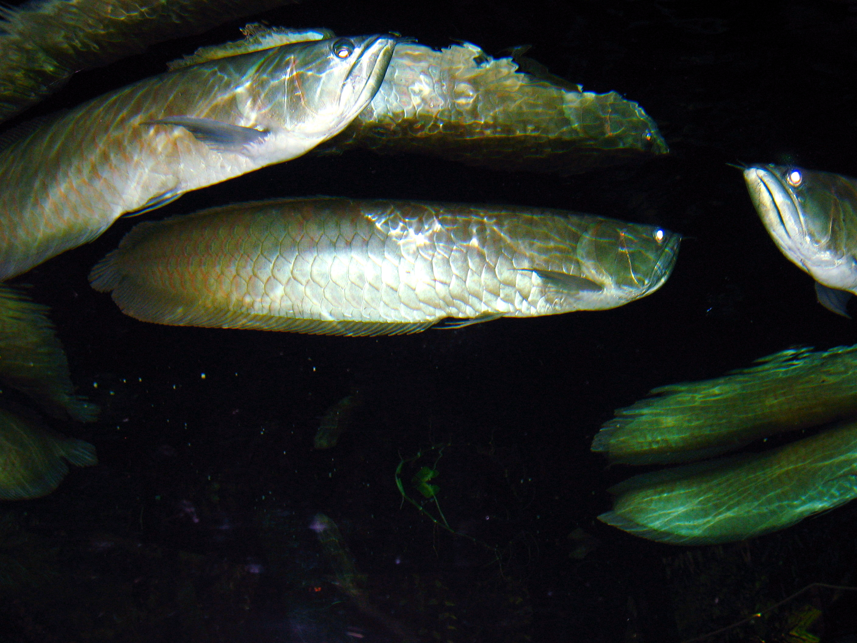 Osteoglossum bicirrhosum in Nausicaä Centre National de la Mer